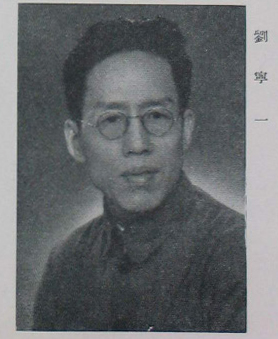 中國人民政治協商會議第一屆全體會議代表